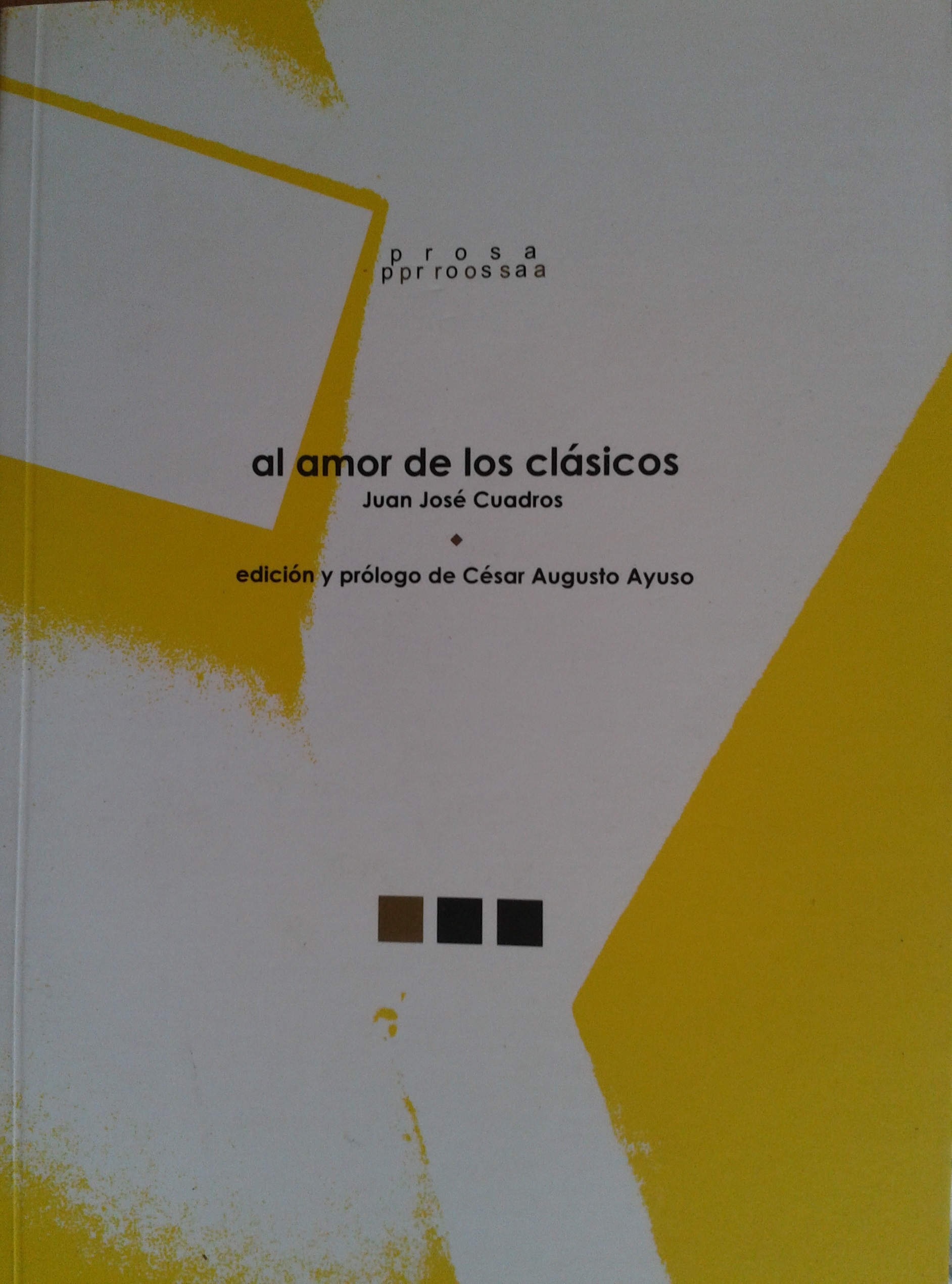 Al amor de los clásicos de Juan José Cuadros Pérez, 2008